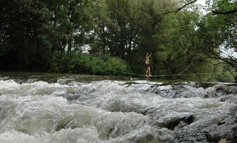 Slackline ueber die Sulm / Steiermark